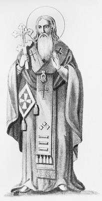 Свт. Герман, еп. Новгородский. Литография. 1891 г.